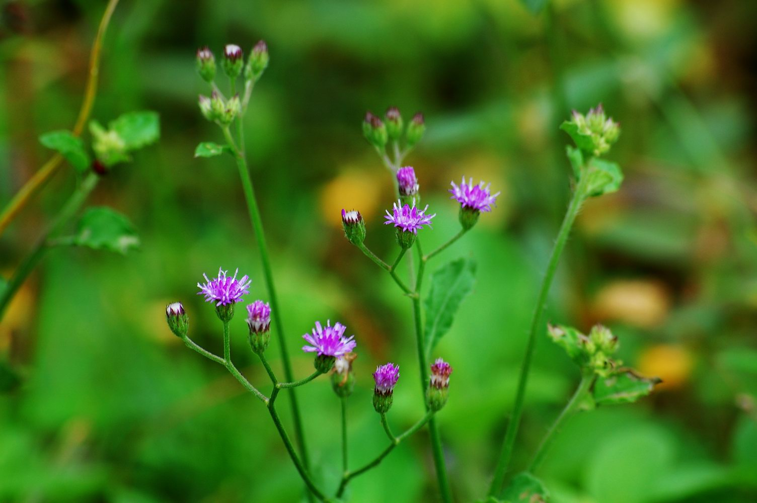 ദശപുഷ്പങ്ങളിലെ പൂവാംകുരുന്നില എന്ന ചെടിയുടെ ചിത്രം സ്വയം എടുത്തത്